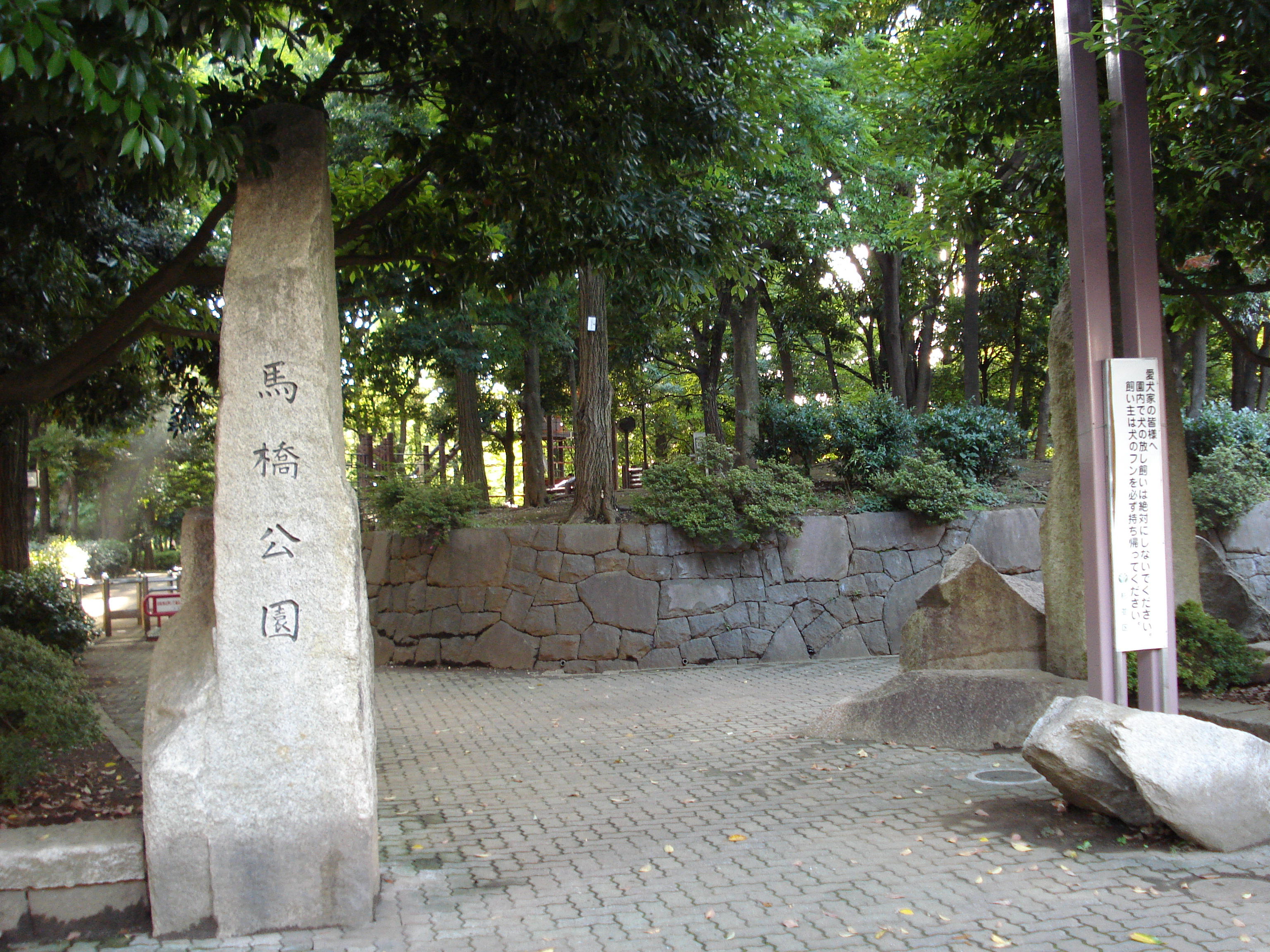 park